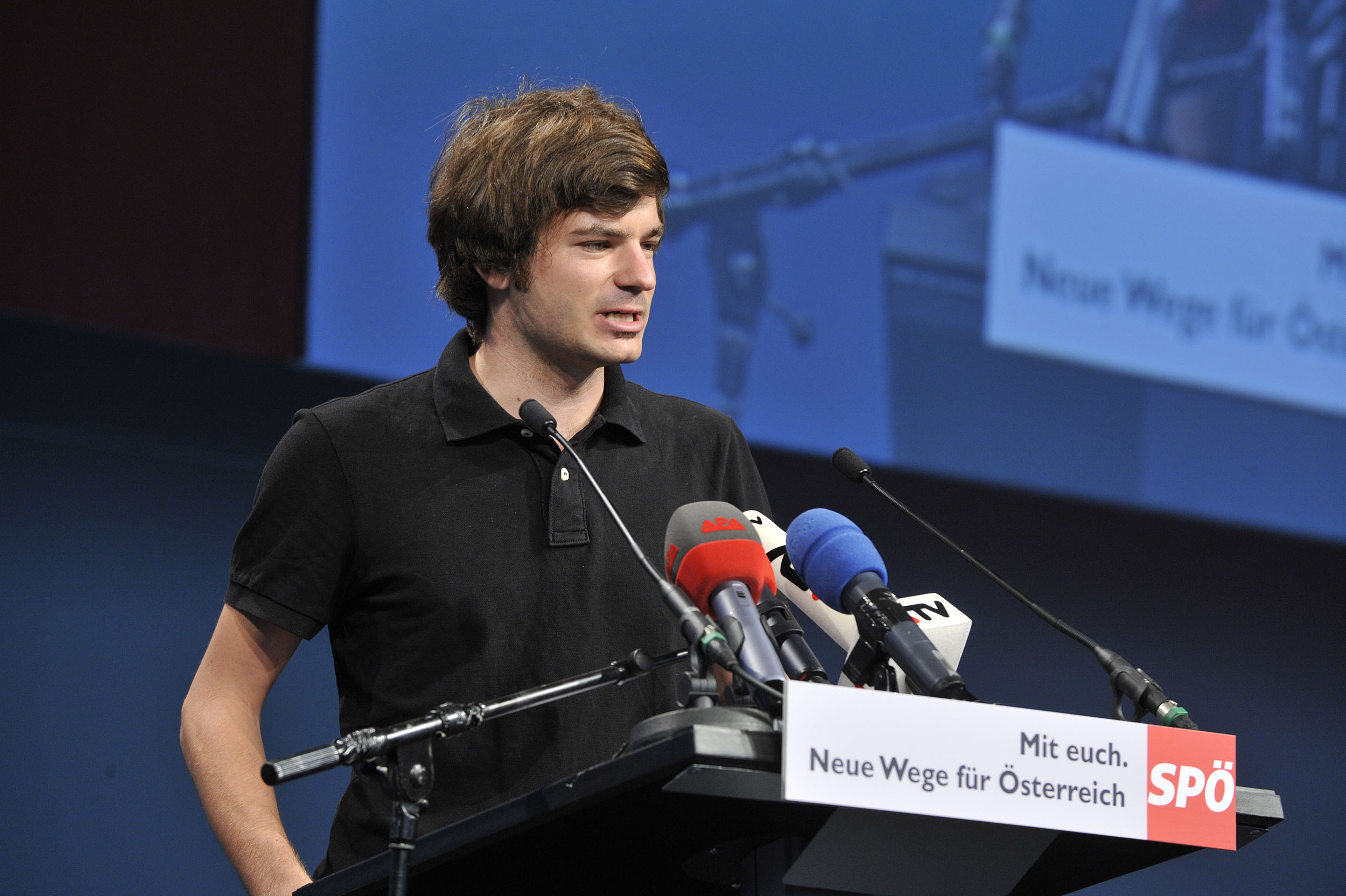 40. Ordentlicher Bundesparteitag 2008 im Linzer Design-Center. Hier Wolfgang Moitzi, Verbandsvorsitzender der Sozialistischen Jugend.